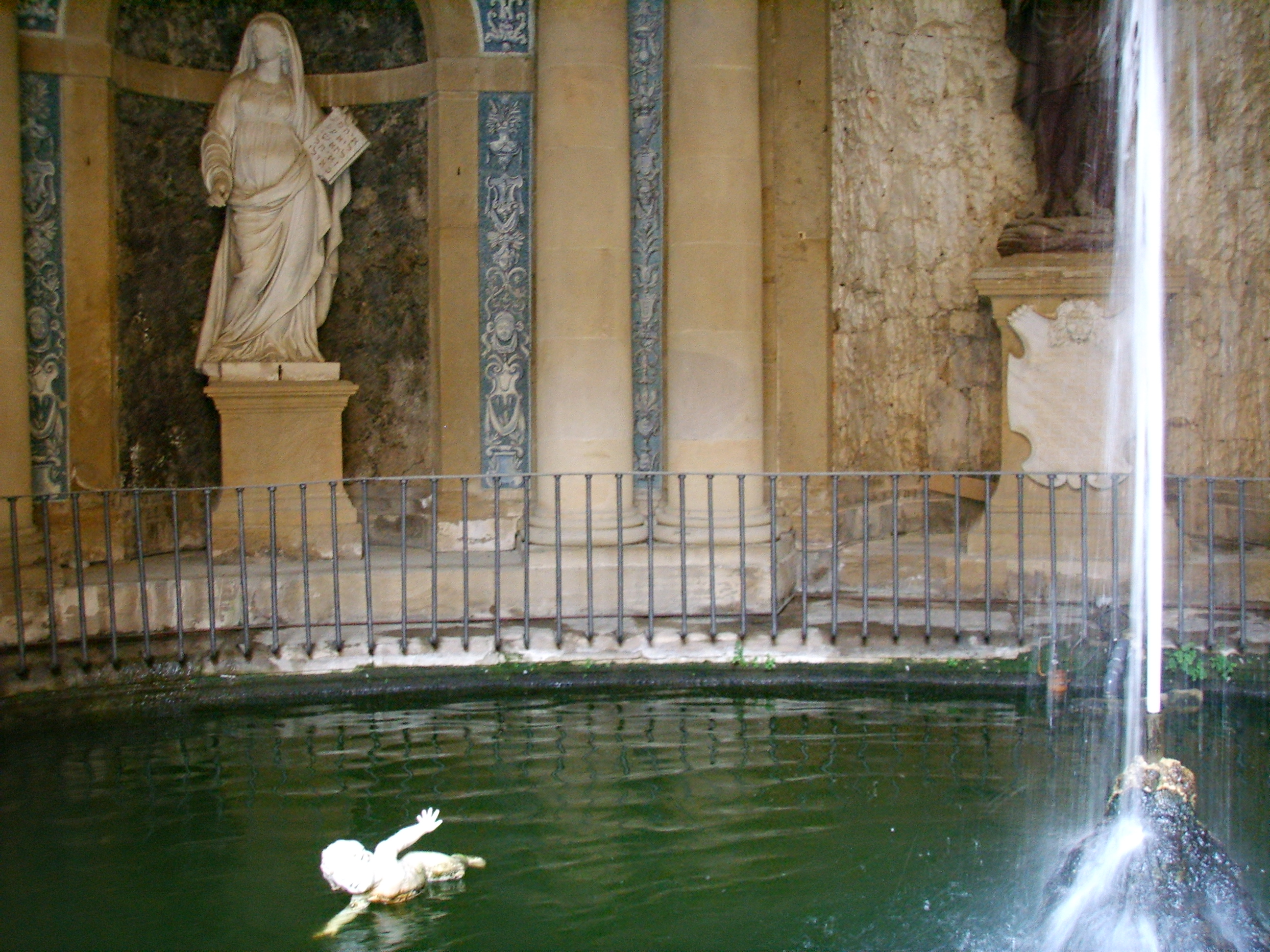 Grotta del Mosè nel cortile di Palazzo Pitti a Firenze. La Legge, una delle quattro statue rappresentanti Le Virtù del Principe secondo un impianto allegorico ideato da Francesco Rondinelli (erudito e bibliotecario dei granduchi): 1. La Carità, di Agostino Ubaldini, 1623; 2. L'Imperio, di Domenico Pieratti, 1635-36; 3. Lo Zelo, di Domenico Pieratti, 1635-36; 4. La Legge, di Antonio Novelli, 1635.